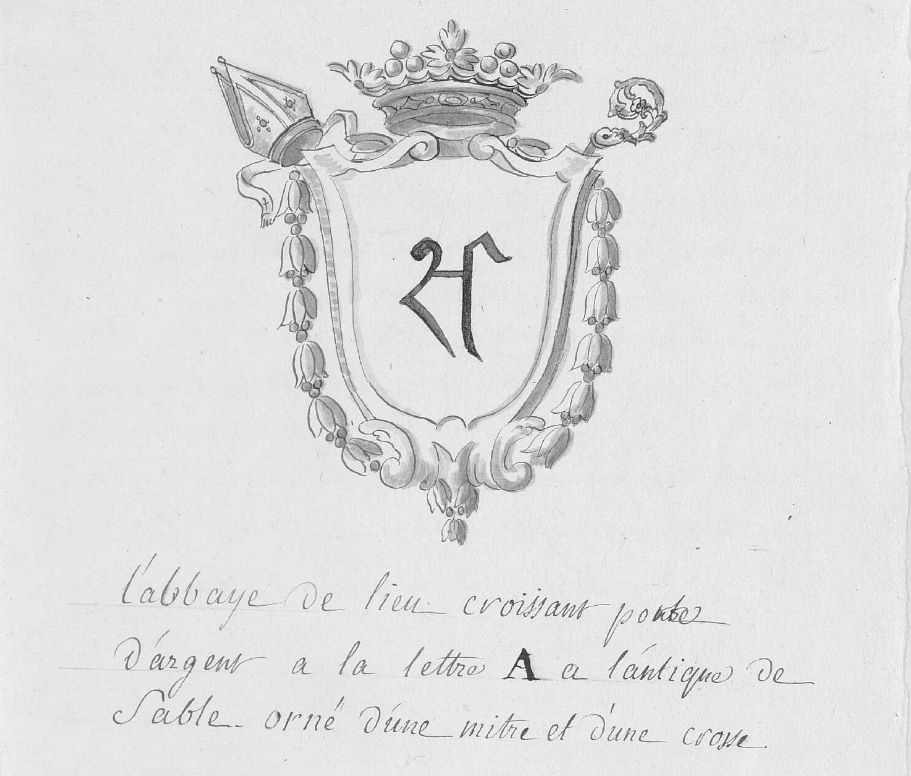 Armoiries de l'abbaye de Lieu-Croissant (Doubs), reproduites dans le Manuscrit Baverel 39 (Notes sur l'abbaye des Trois Roys) par l'abbé J.-P. Baverel, conservé à la bibliothèque municipale de Besançon.